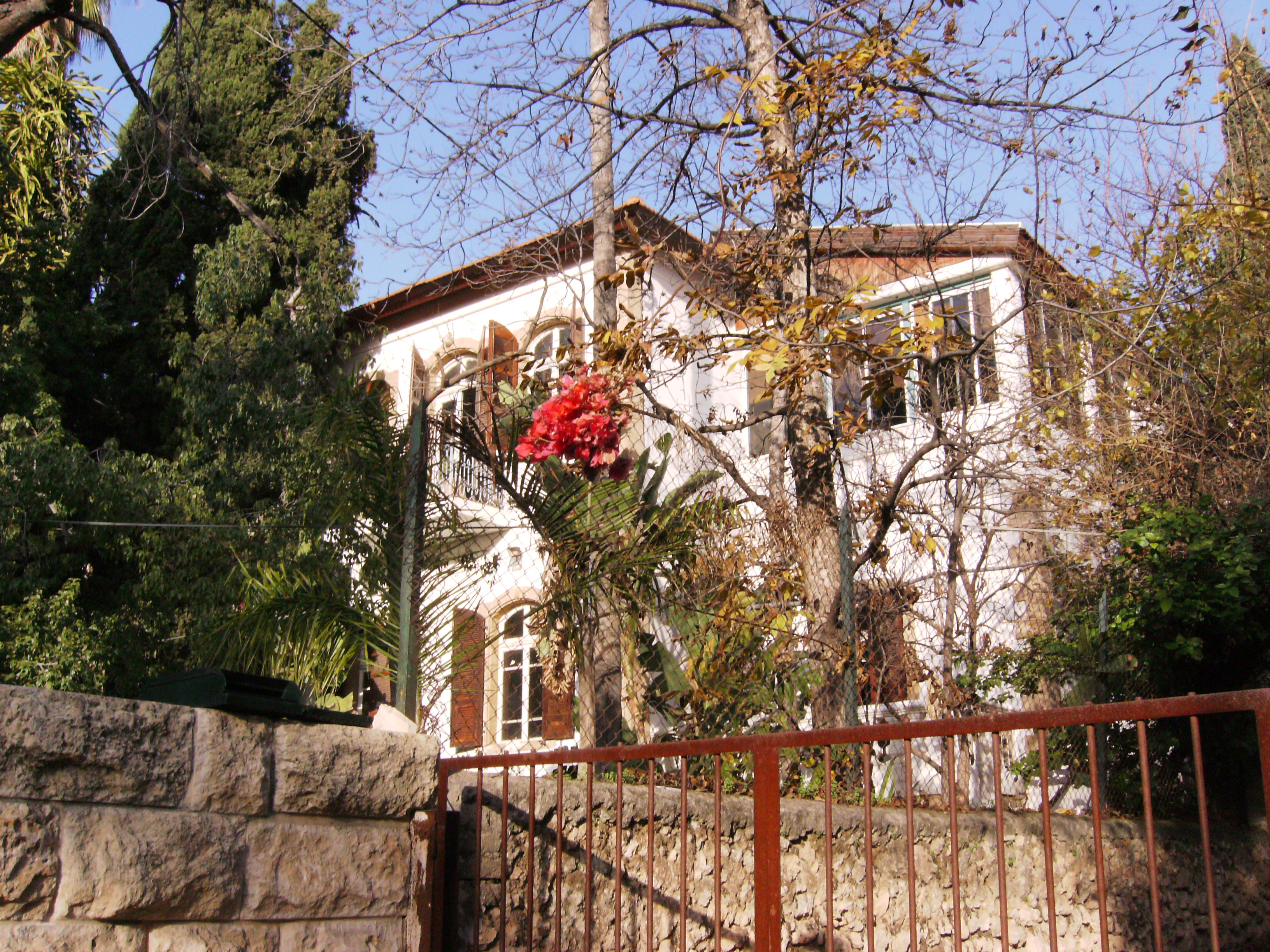 ברחוב מנוחה ונחלה התגוררו העשירים של אותם ימים ומשום כך הוא כונה רחוב המיליונרים. בתים לדוגמא: בית זקס - מס' 54, בית ברוידא - מס' 56.